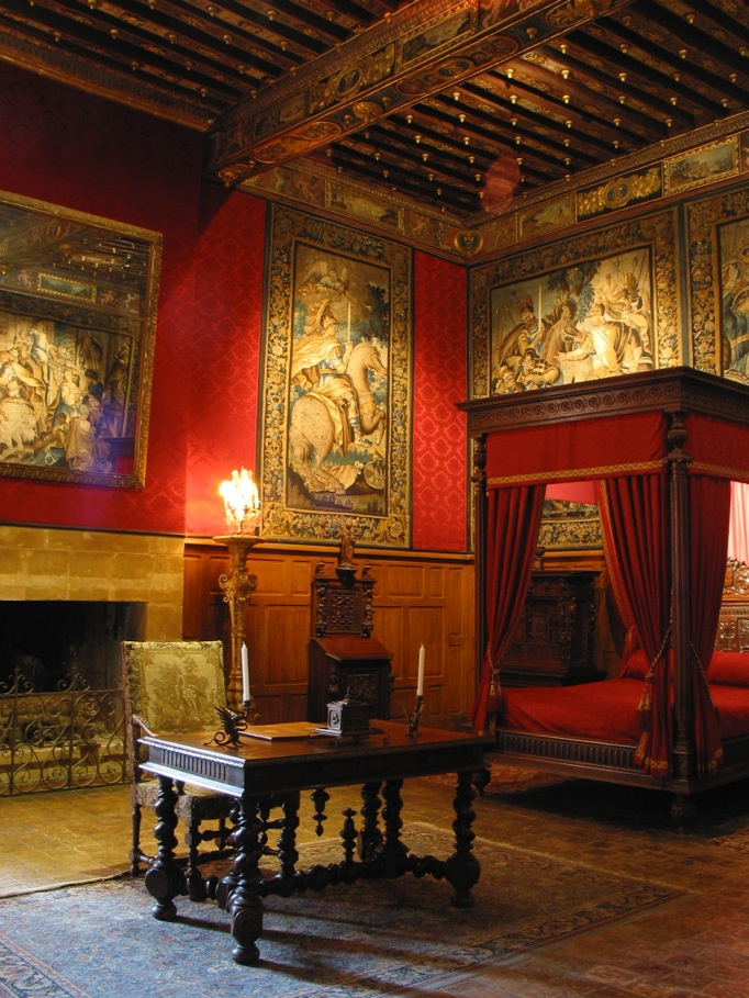 Camera da letto di Luigi XIII, castello di Brissac